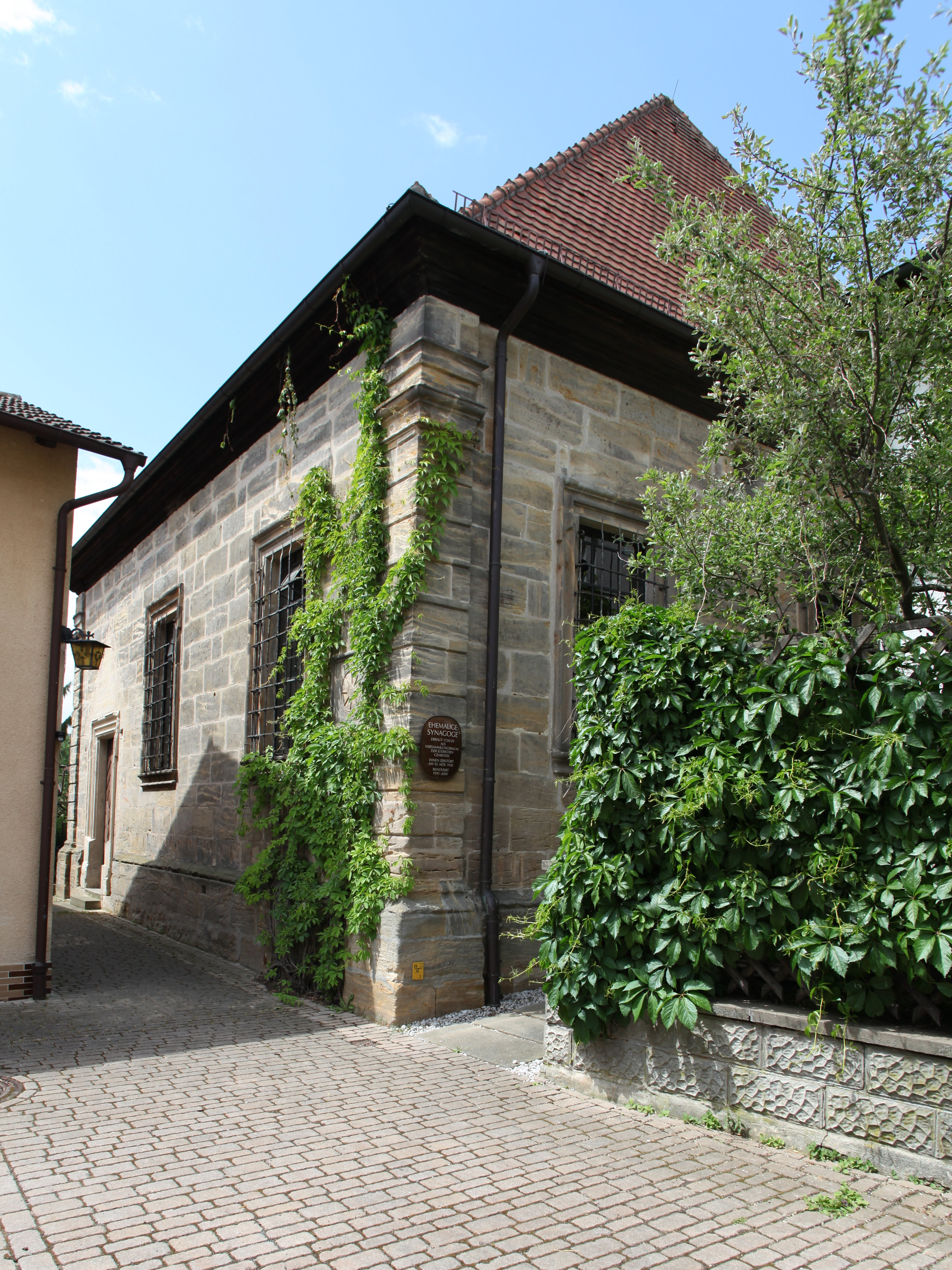 ehemalige Synagoge, rechteckiger Saalbau mit Walmdach, Sandsteinquader und Werksteingliederungen, 1727/28, Memmelsdorf (OT von Untermerzbach), Judengasse 6